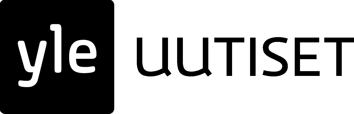 Yle Uutisten logo